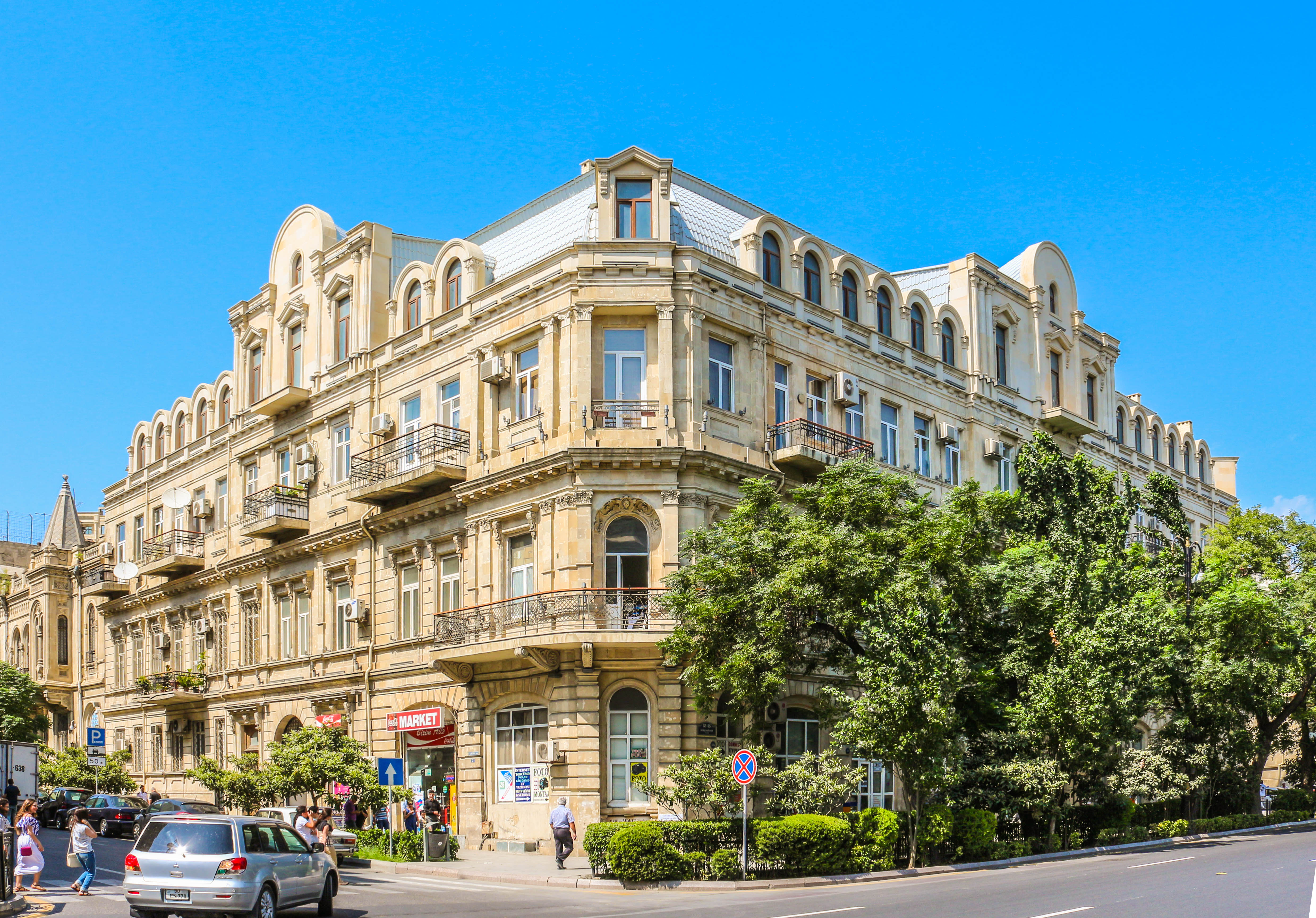 Yaşayış evi, İstiqlaliyyət küç., 35